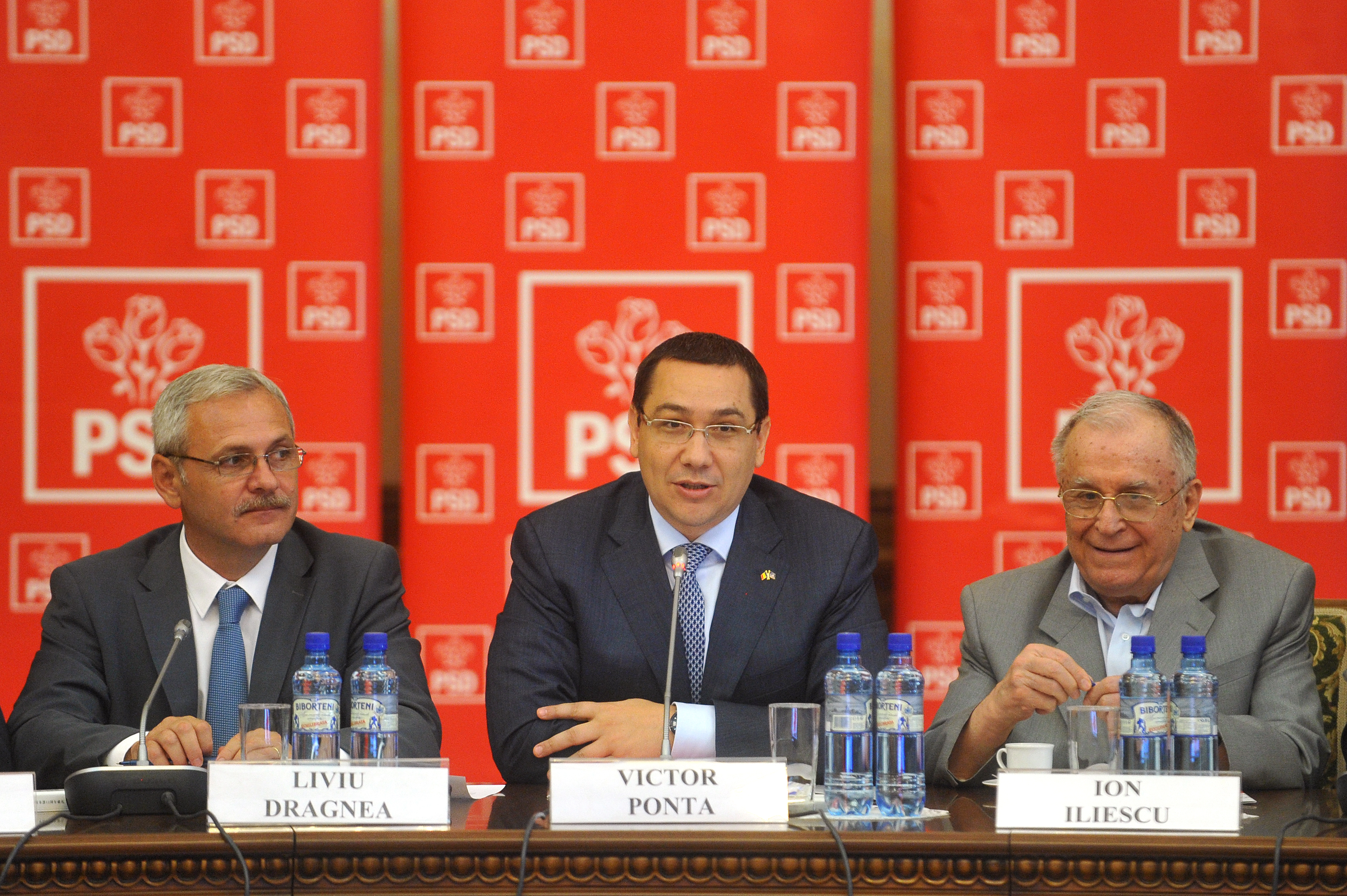 CExN al PSD - 29.05 (8)